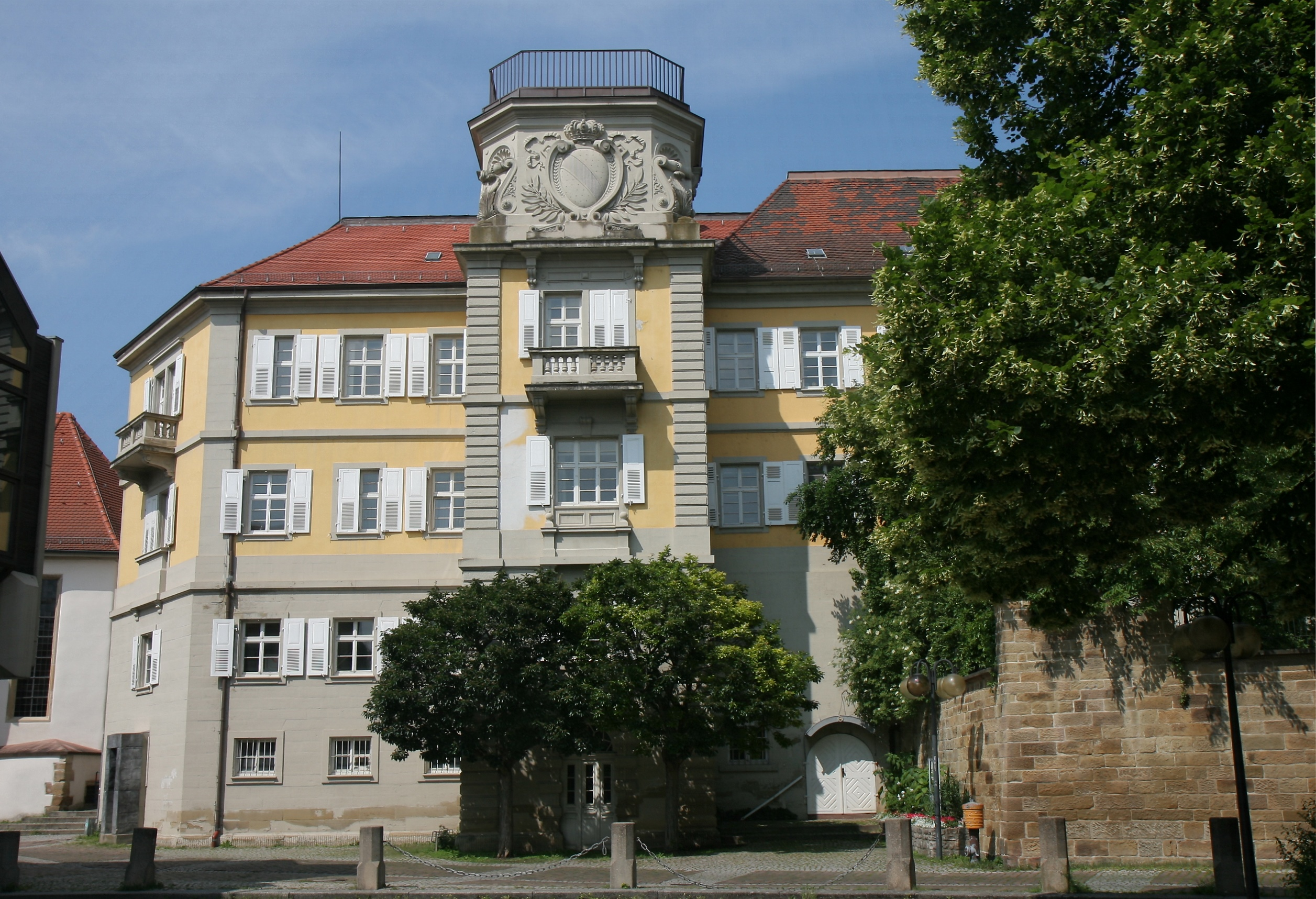 Amtsgericht Bretten im Gebäude des ehemaligen Amtshauses, Obere Kirchgasse 9/Ecke Steingasse in Bretten.